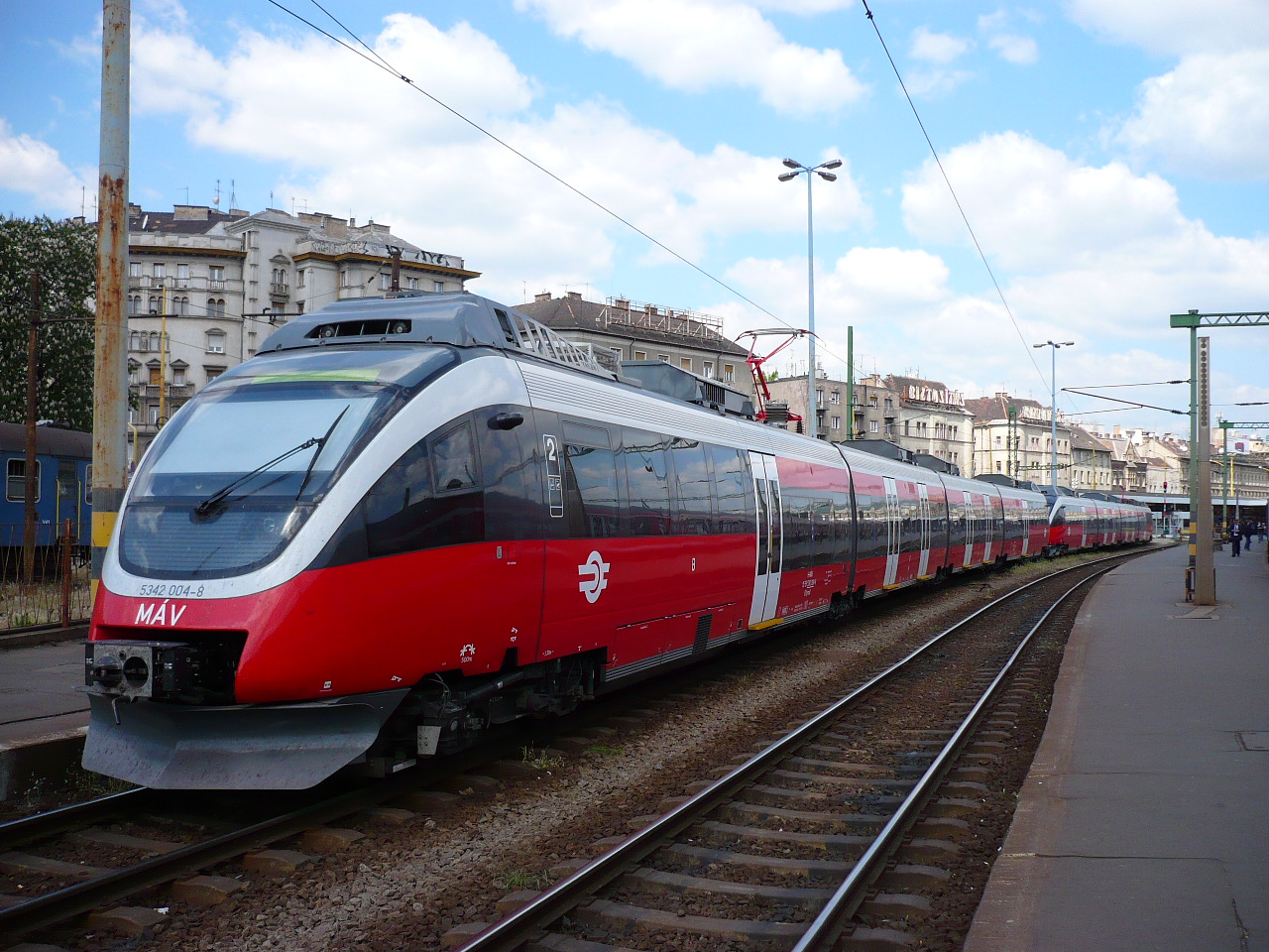 MÁV Telent der Reihe 5342 im Bahnhof Budapest Déli (Südbahnhof)